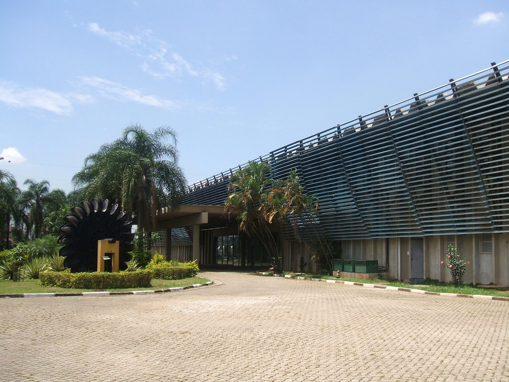 Fachada do Museu de Tecnologia, em São Paulo, Brasil. No plano intermediário, uma roda (turbina) Pelton.